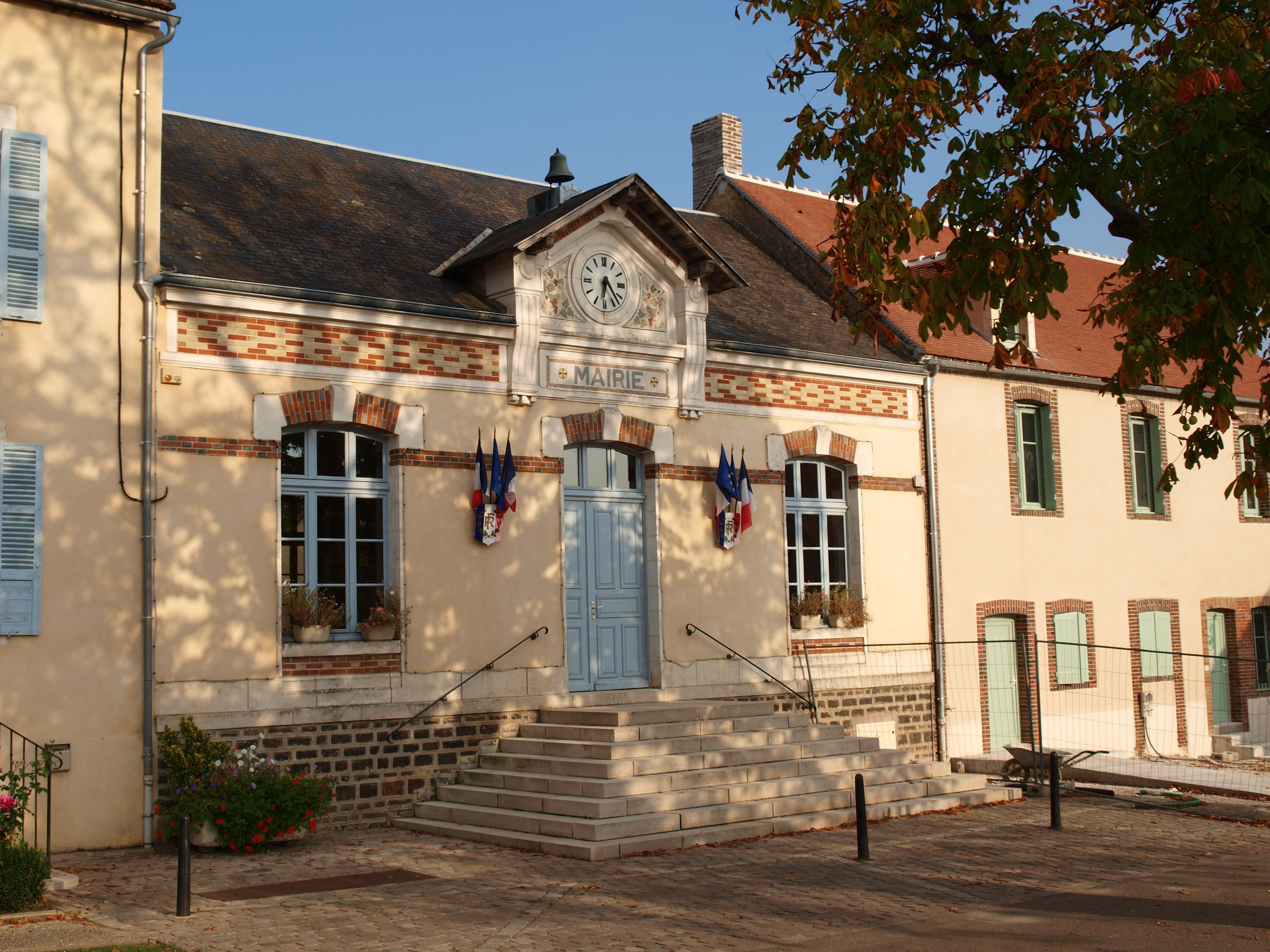 Diges (Yonne, France) ; mairie